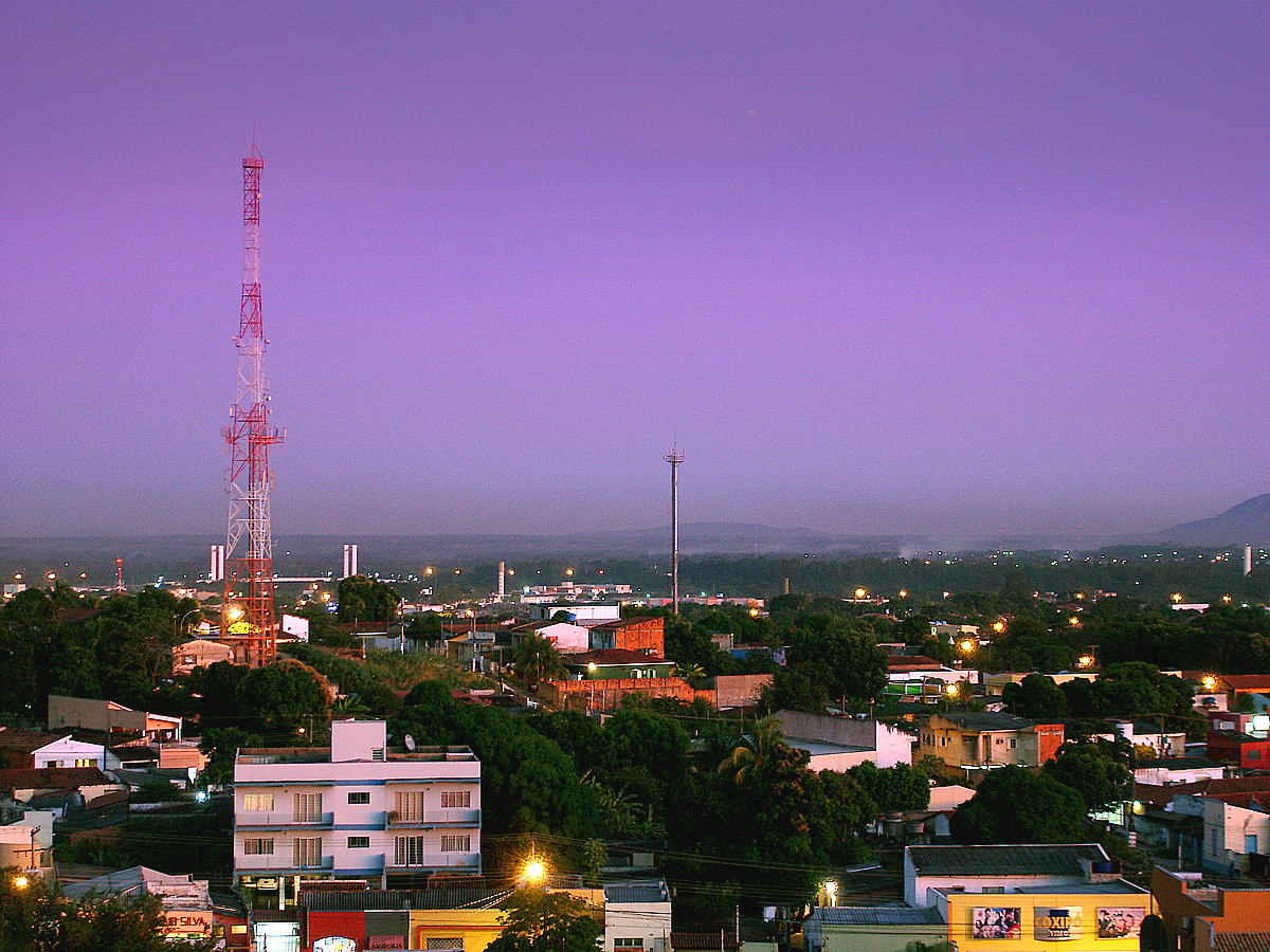 Cuiaba, Brasile